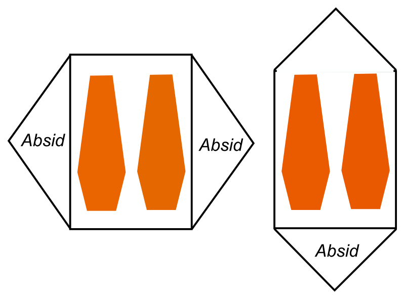 Tunneltält